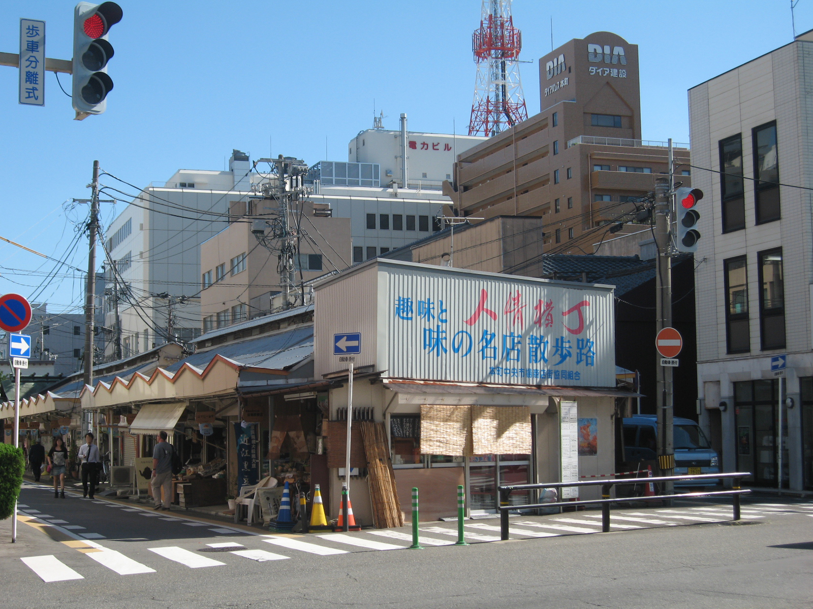 新潟県新潟市中央区。人情横丁の画像。